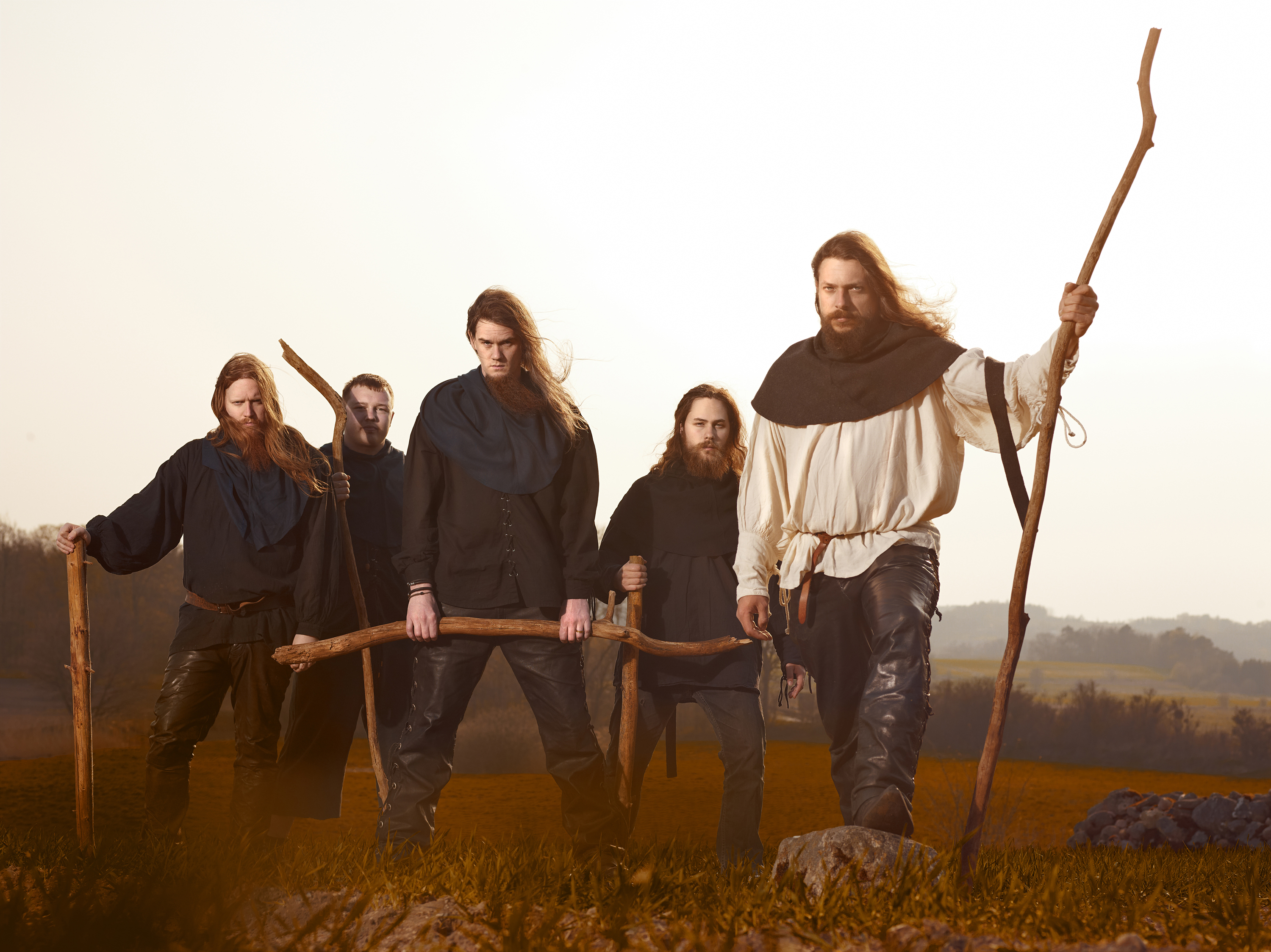 Svartsot - et folk metal-band fra Danmark.